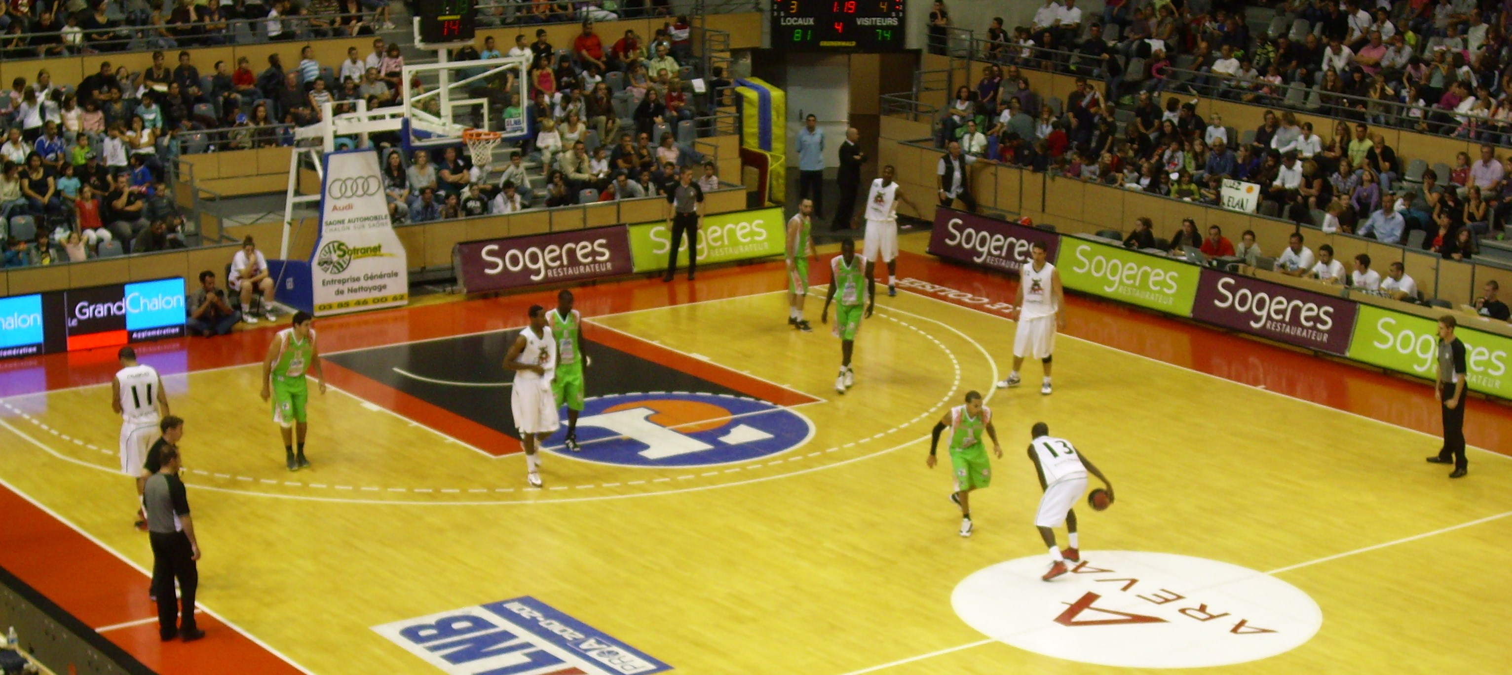 Match amical au colisée entre l'Elan Chalon et la JL Bourg-en-Bresse (saison 2011-2012)